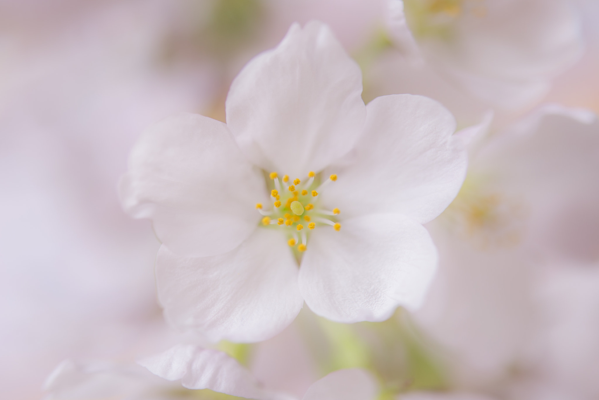 500px provided description: さくら [#?]